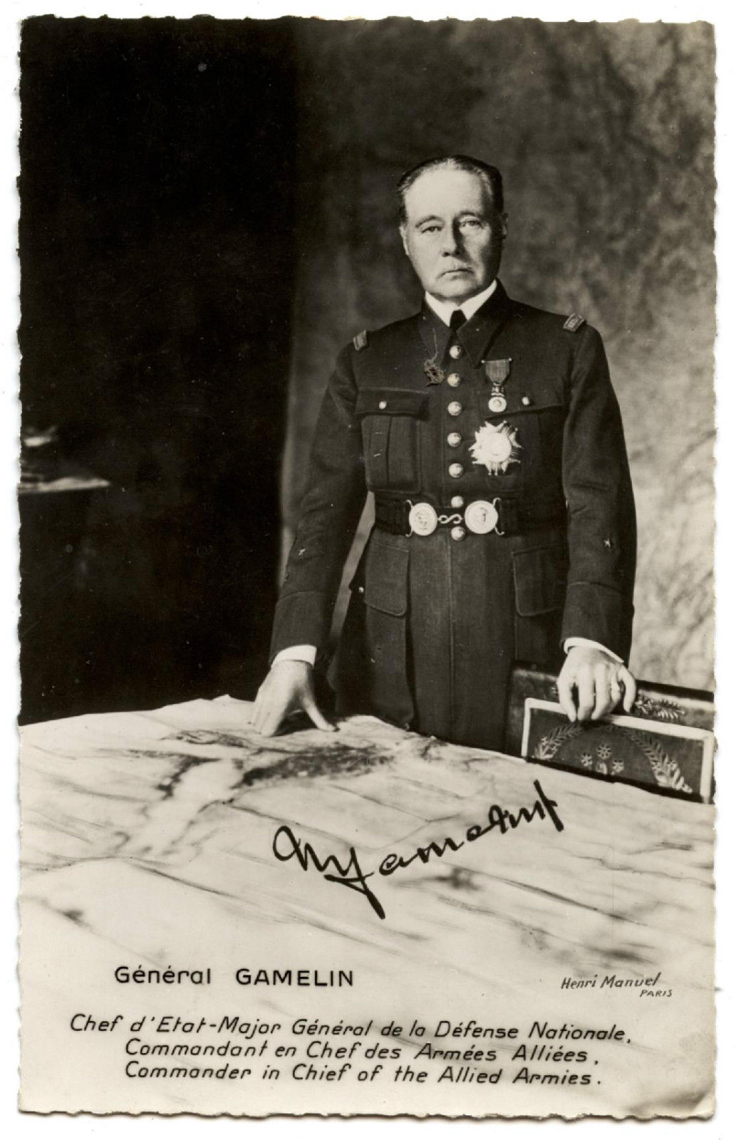 Le général Maurice Gamelin. Portrait photographique par Henri Manuel, carte postale éditée vers 1939-1940.